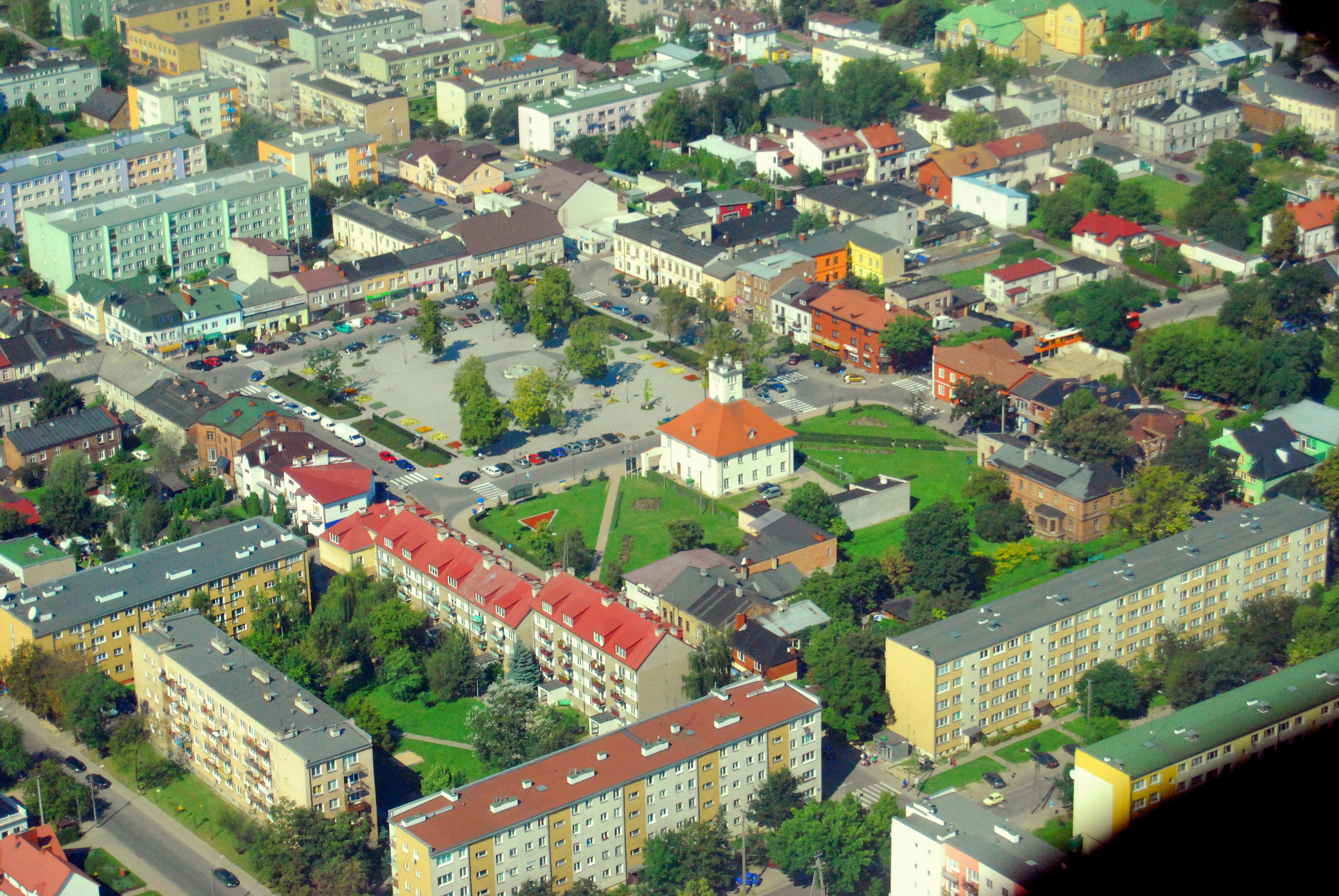 Centrum Błonia widziane z lotu ptaka